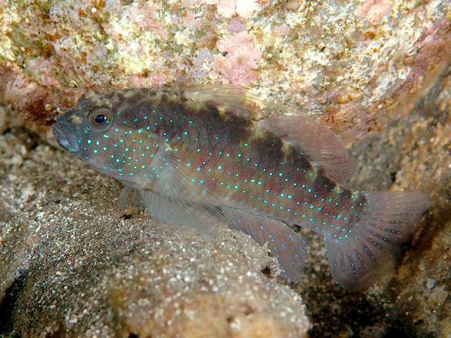 ホシハゼ Asterropteryx semipunctata